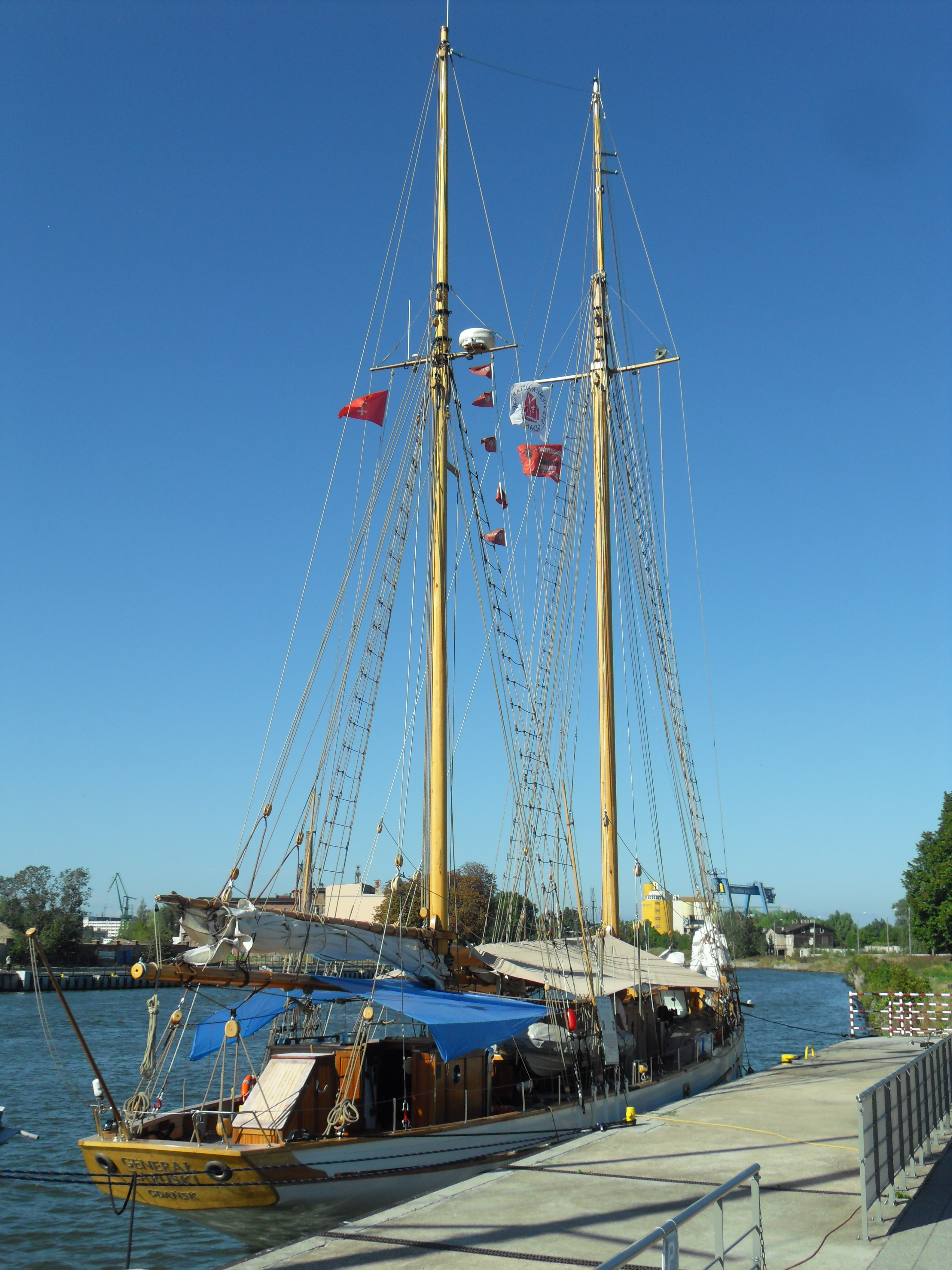 "Generał Zaruski" na Motławie w Gdańsku, przystań MOSiRu przy ul. Na Stępce (Długie Ogrody).